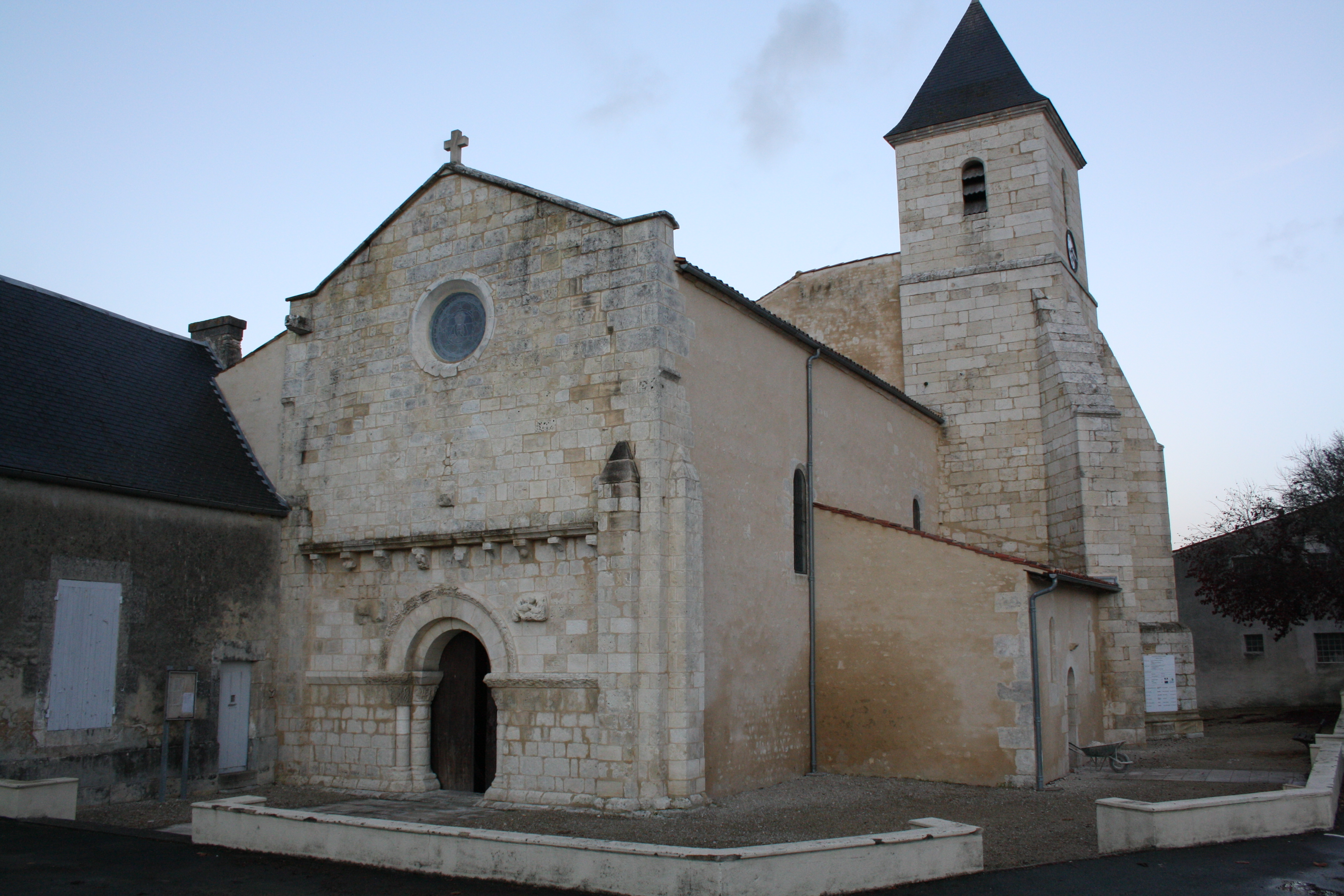 Église Saint-Hilaire de Saint-Hilaire-de-Villefranche, Charente-Maritime (France).